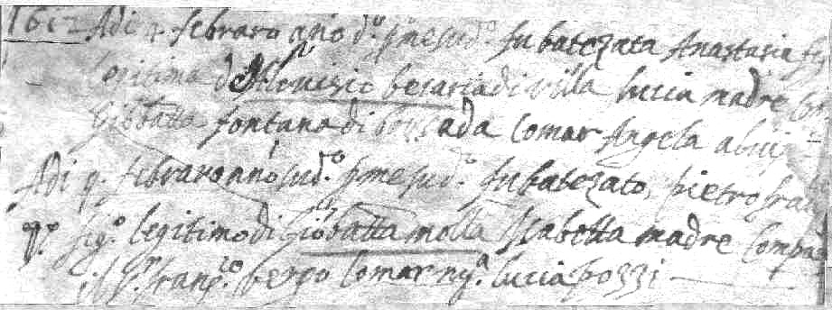 Celso Mosca, Coldrerio registro dei battesimi della parrocchiale di Coldrerio, registrazione del battesimo di Pier Francesco Mola